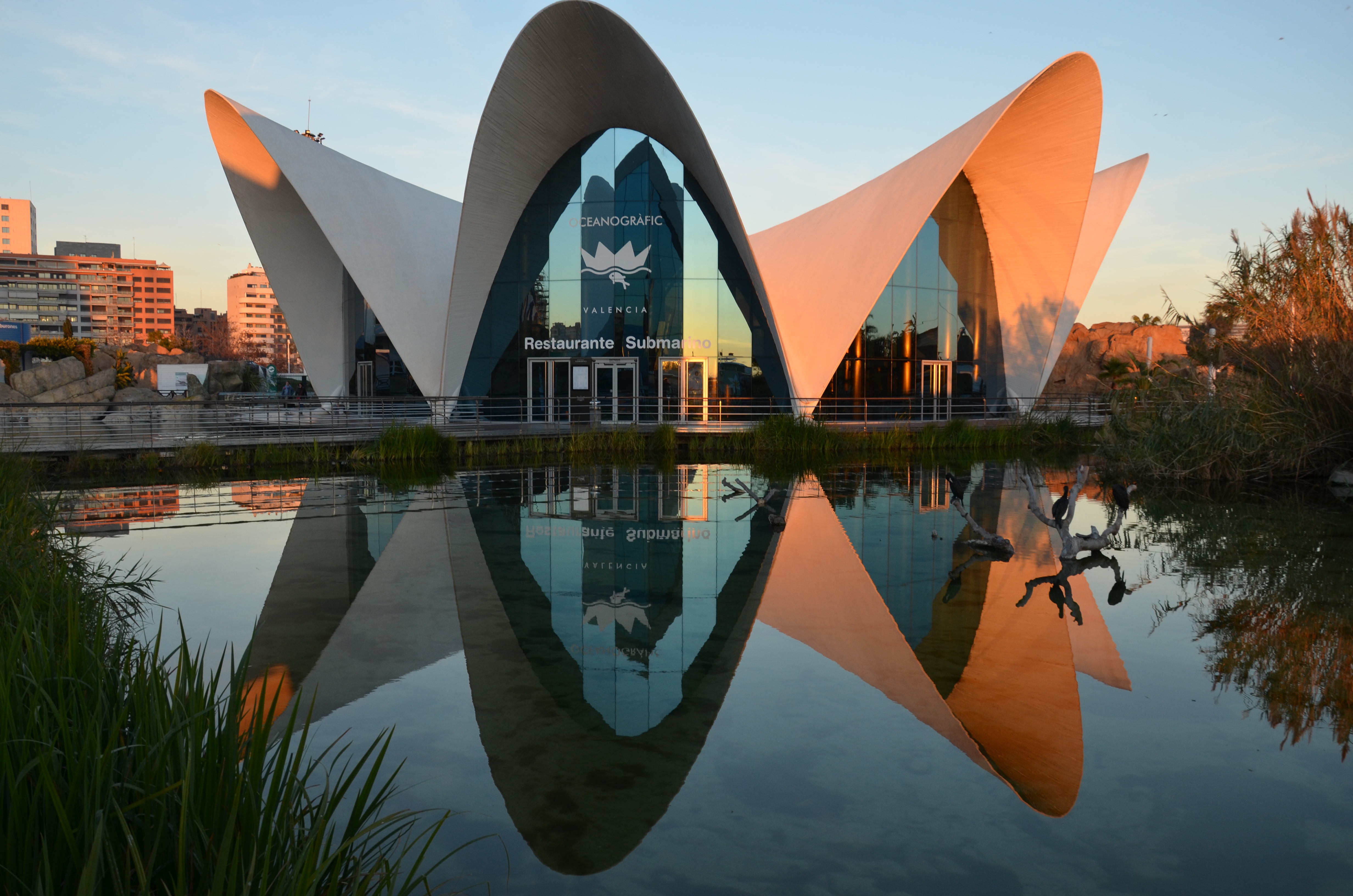 L'Oceanogràfic in Valencia, het grootste aquariumcomplex van Europa.